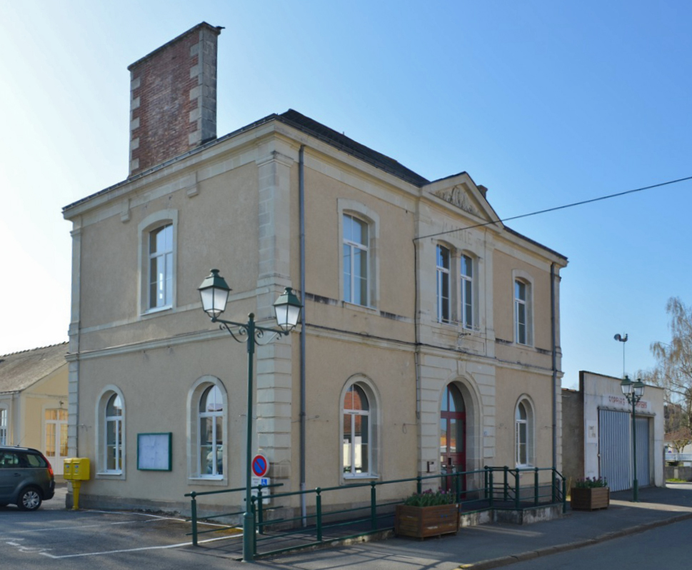 Mairie de Saint-Colomban (Loire-Atlantique)